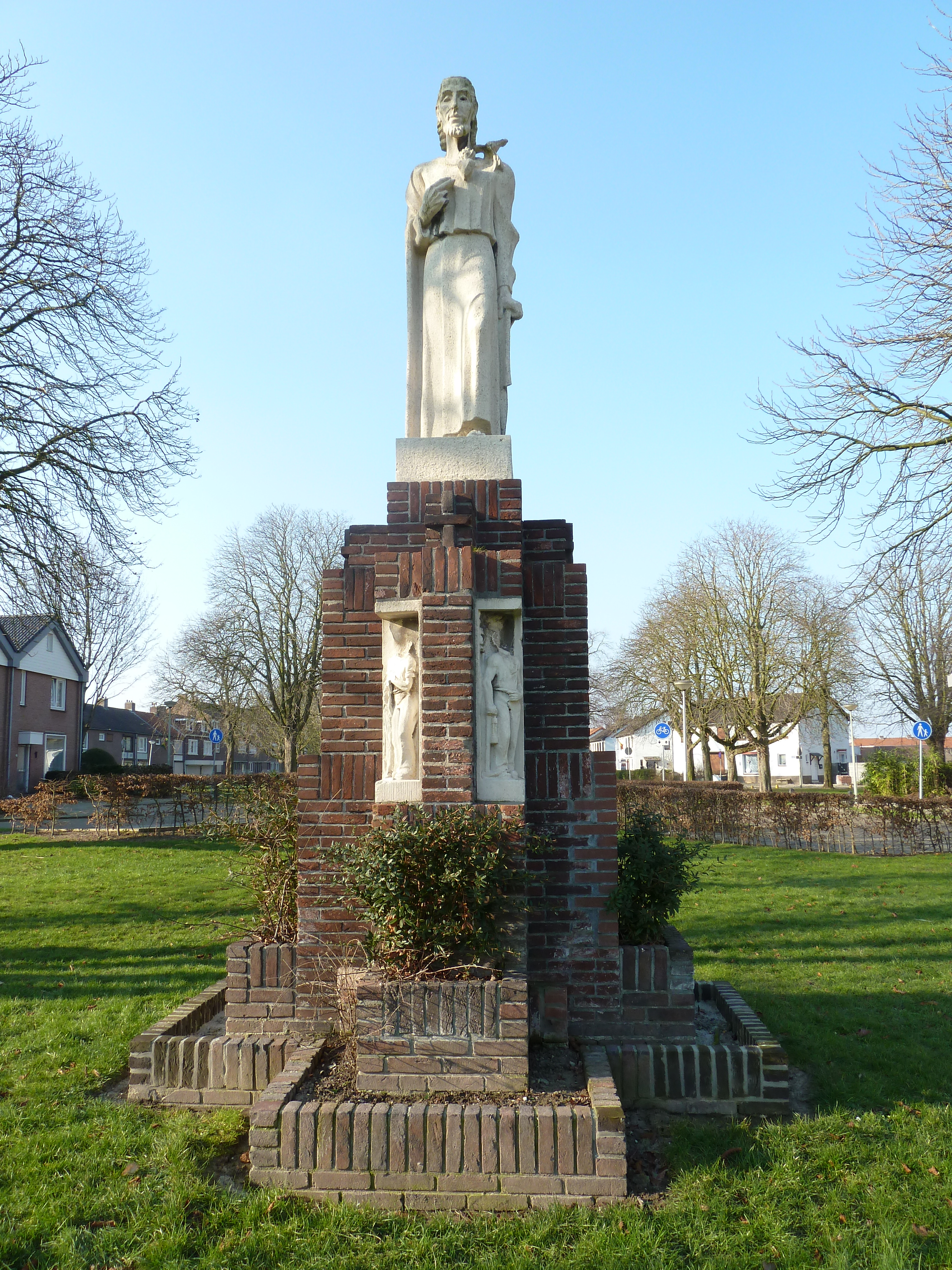 Heilig Hartbeeld op Kerkplein, Hoensbroek, Heerlen, Limburg, Nederland